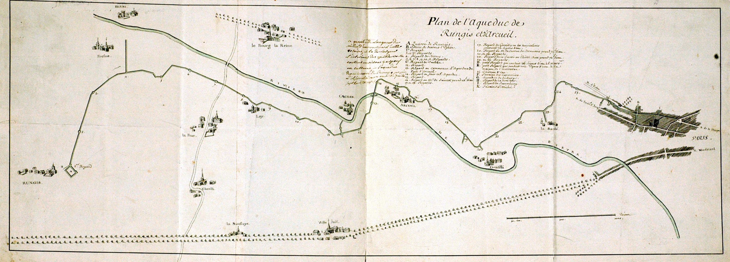 Plan de l'aqueduc Médicis à la fin du XVIIe siècle. Document conservé aux Archives nationales, Paris (AN, N/III/Seine/626)